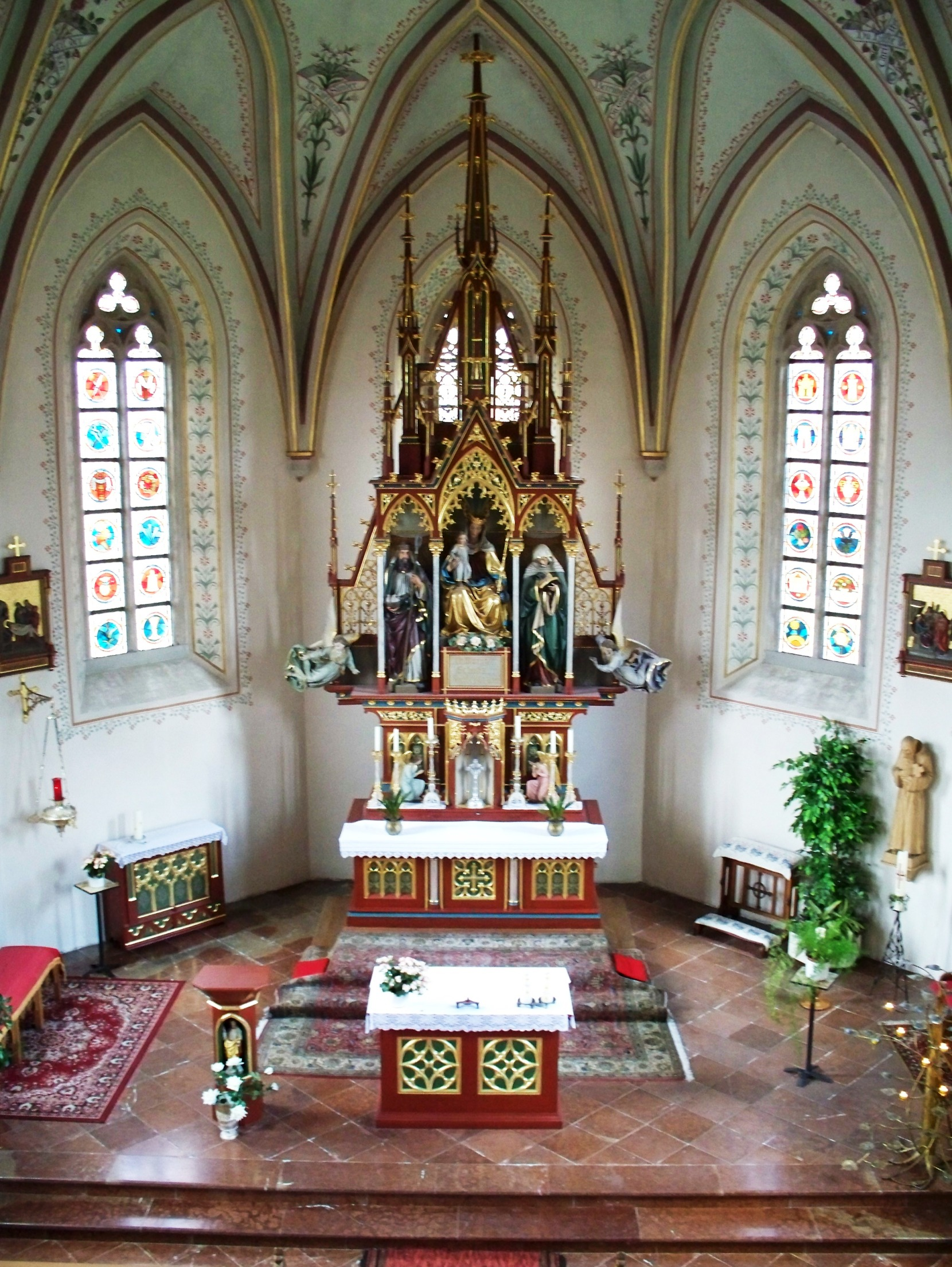 Im Inneren der Wallfahrtskirche Maria Schutz Kronberg in Bad Griesbach.